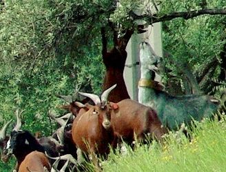 Troupeau de chèvres du Rove, village du Rove (Bouches du Rhône, France)